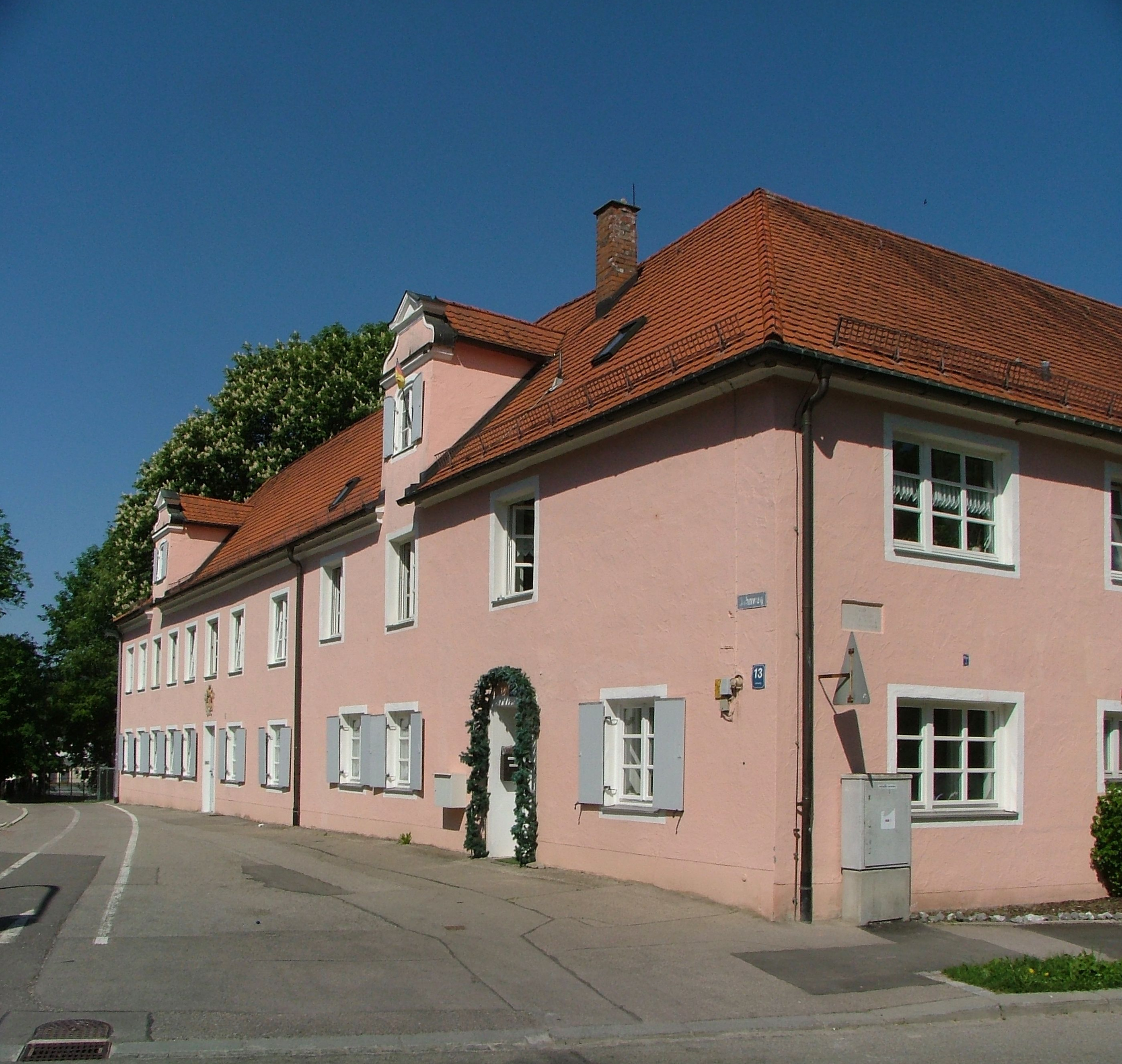 Ehemaliges Landgut der Patrizier Jenisch